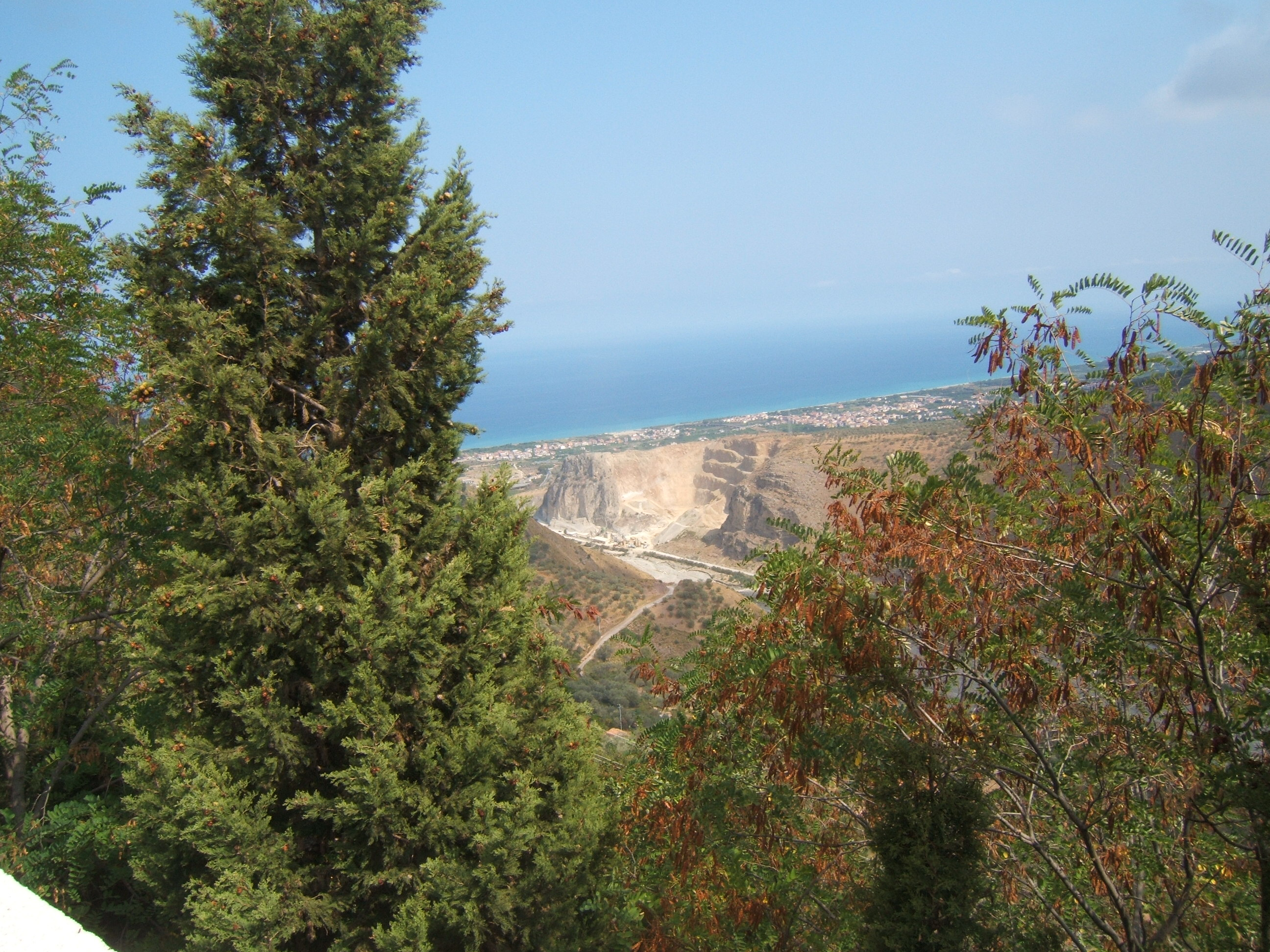 Cava sulla fiumara Rosmarino in Sicilia